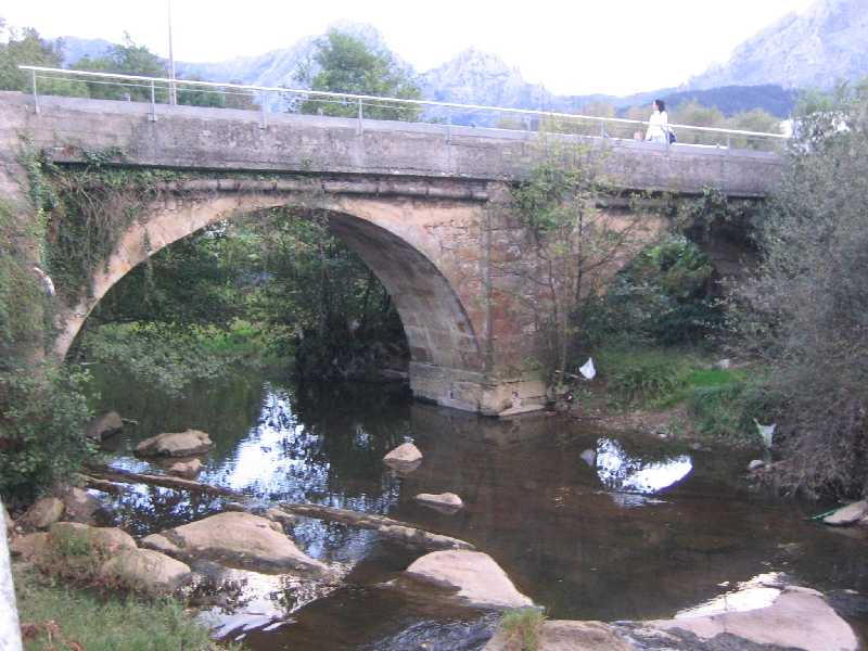 Puente de Astola, Astolako Zubia. propio|PD Fotografía propia --txo 22:43 21 oct, 2005 (CEST)